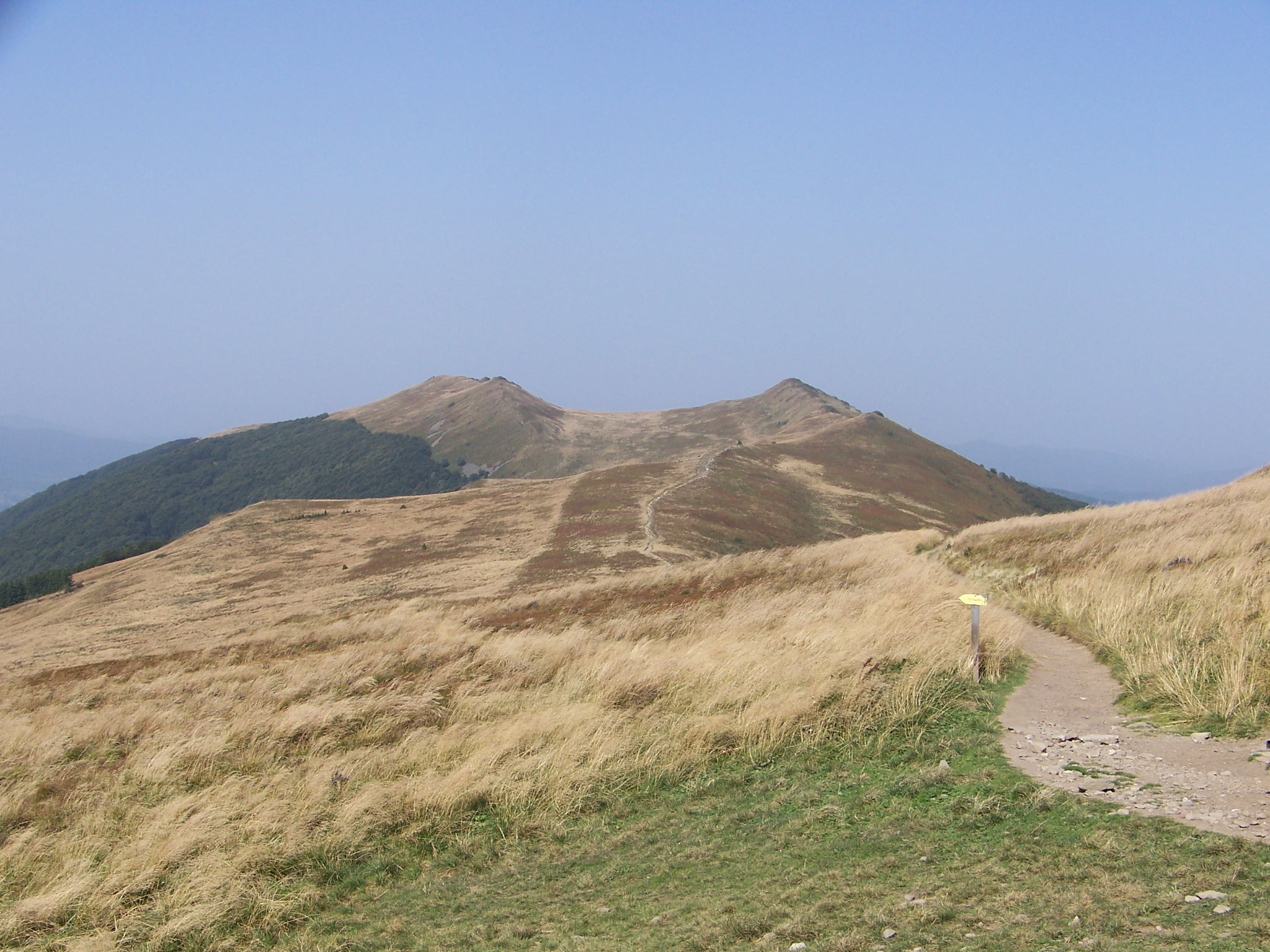 Połonina Wetlińska - widok spod Hasiakowej Skały